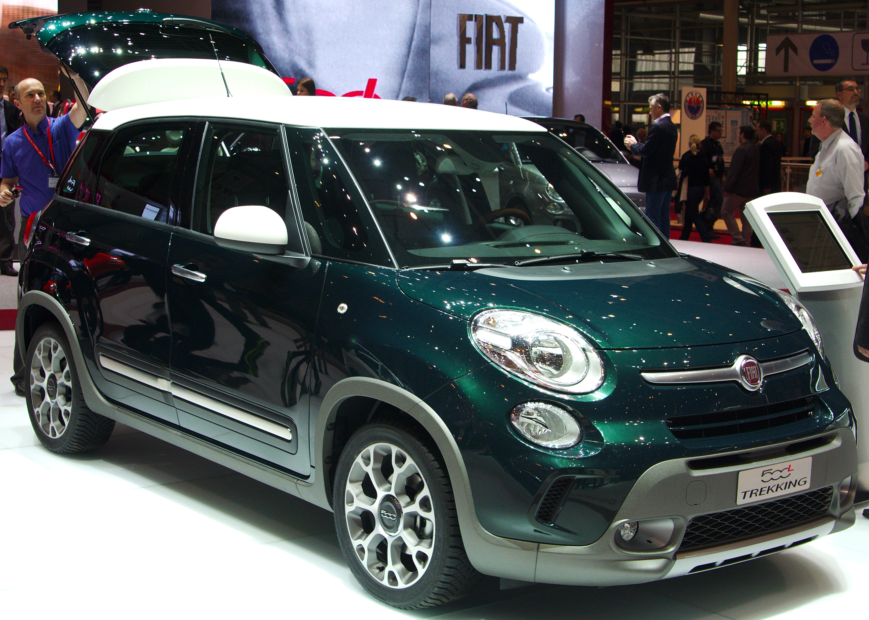 Fiat 500L Trekking (immagine ritoccata in luminosità e contrasto sull'originale)